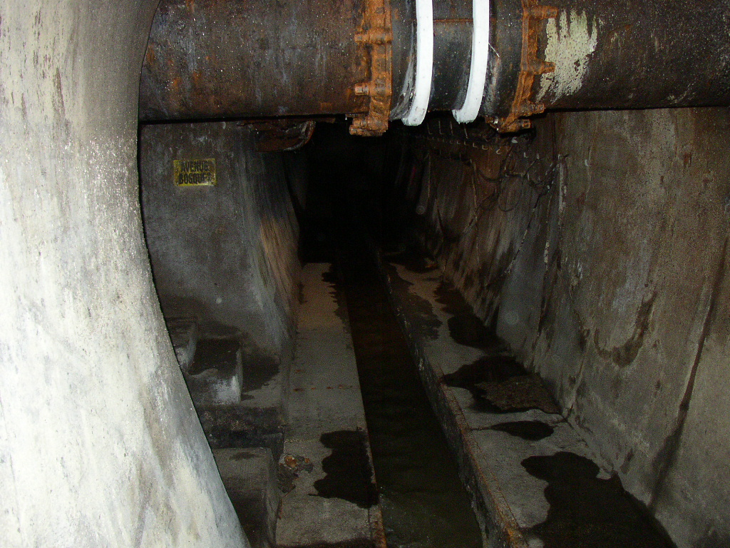 Un cunicolo delle fogne di Parigi. Immagine realizzata da pnc_net.